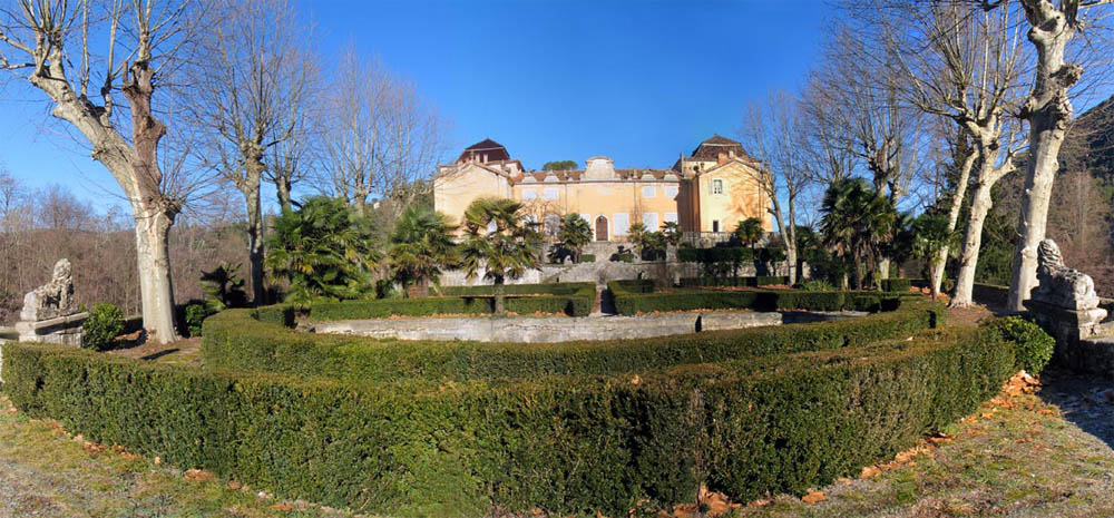 Description de l'image : château de Saint-Laurent-Le-Minier prise le 3/1/2004 Source : --fredciel 21 déc 2004 à 09:39 (CET)